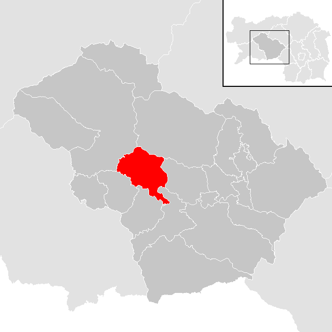 Lage von Pöls-Oberkurzheim im Bezirk Murtal